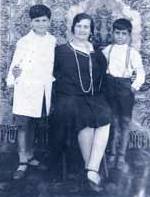 Raquel Liberman, mujer víctima de la trata de blancas de la organización criminal Zwi Migdal.